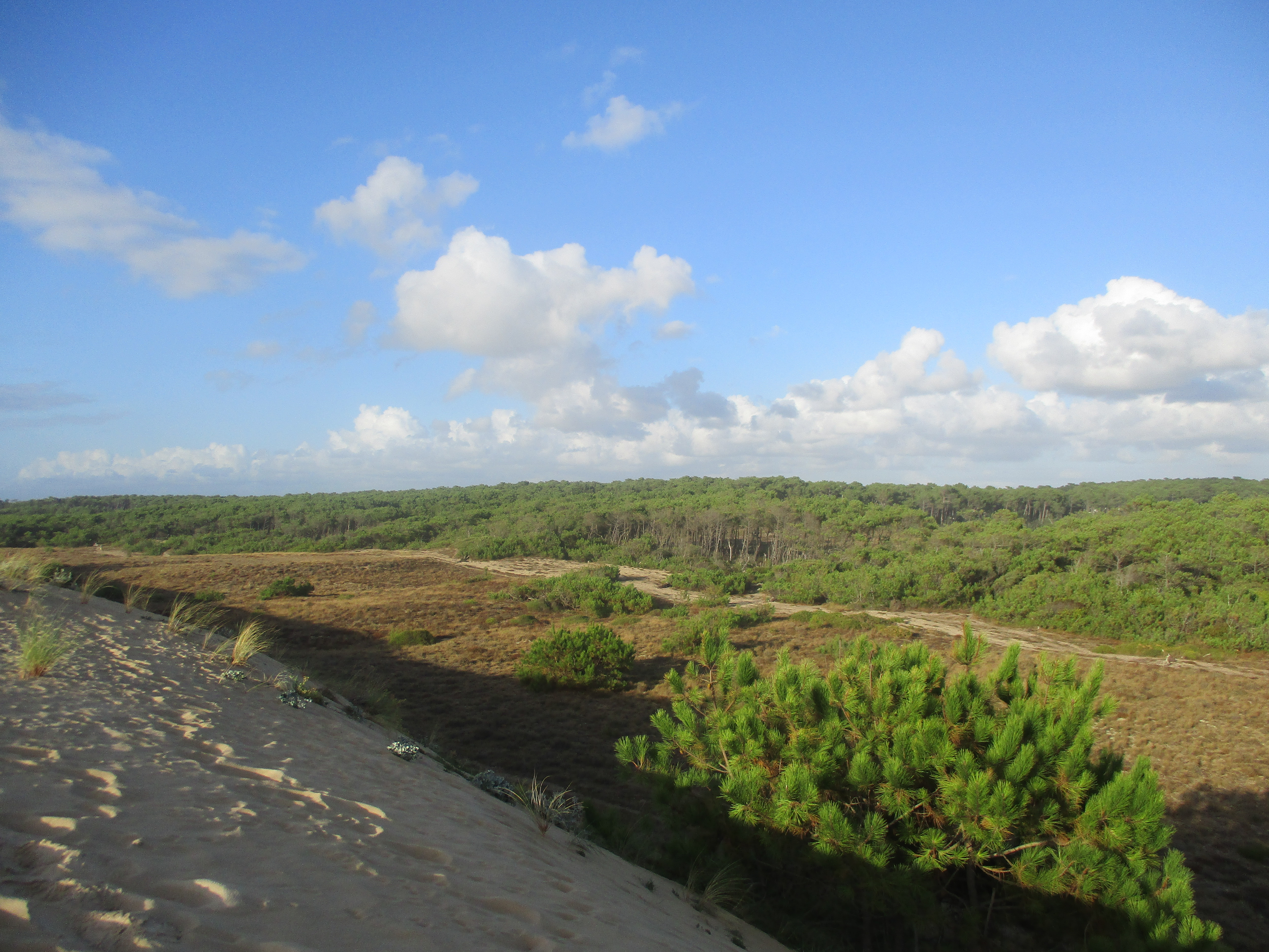 Dune près de la plage de la Blette Blanche à Saint-Girons (Landes).